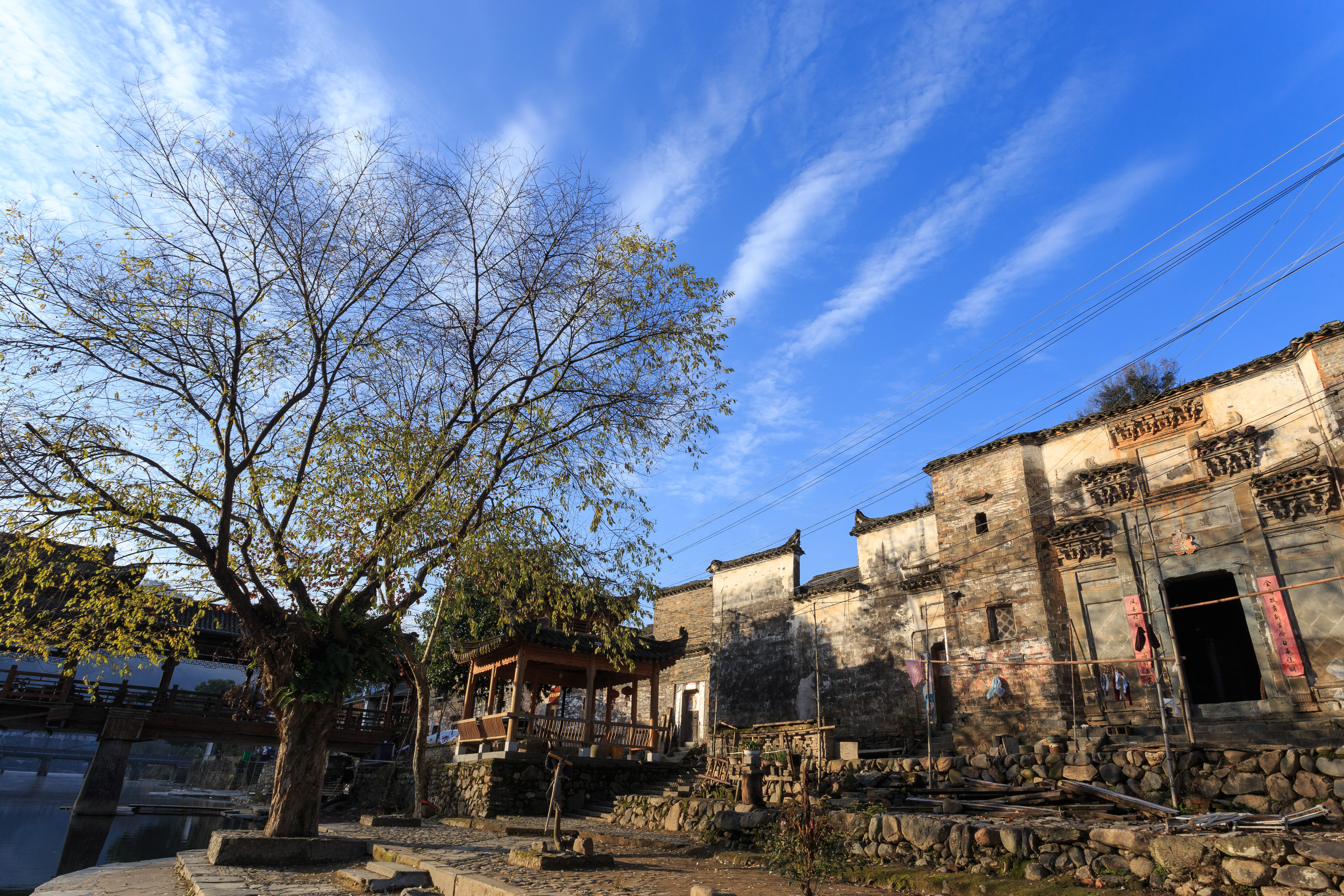 瑶里